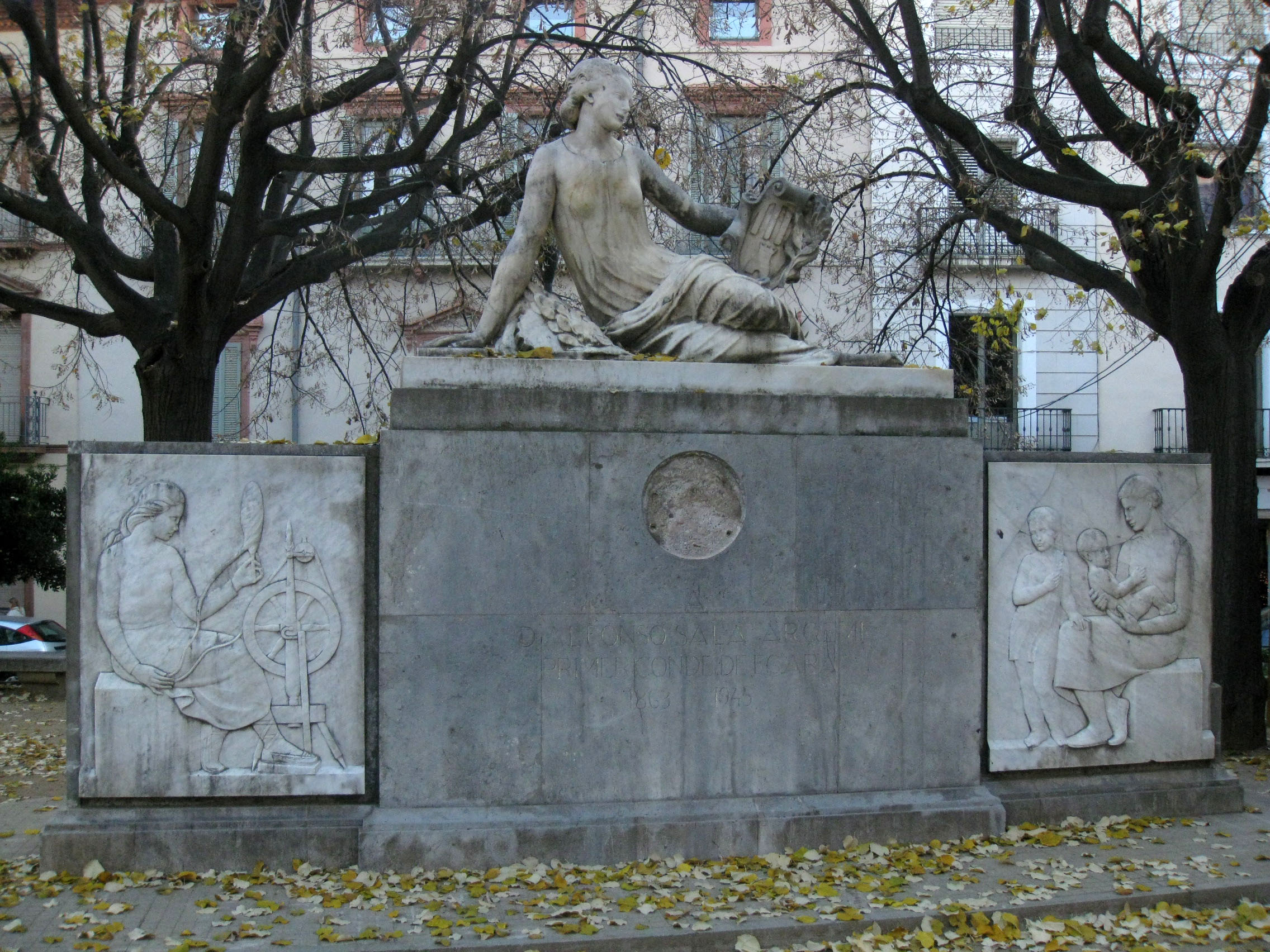 Monument a Alfons Sala, comte d'Ègara, al passeig del Comte d'Ègara (Terrassa). Escultura de Frederic Marès (1950).